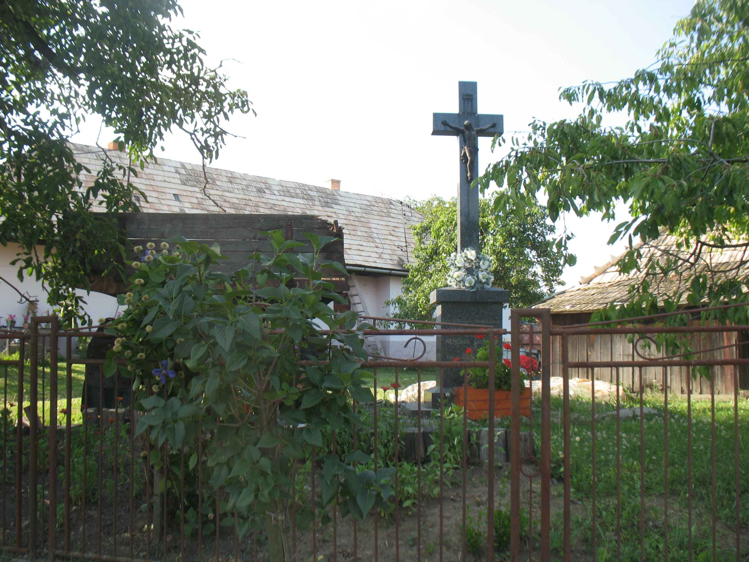 Szelény